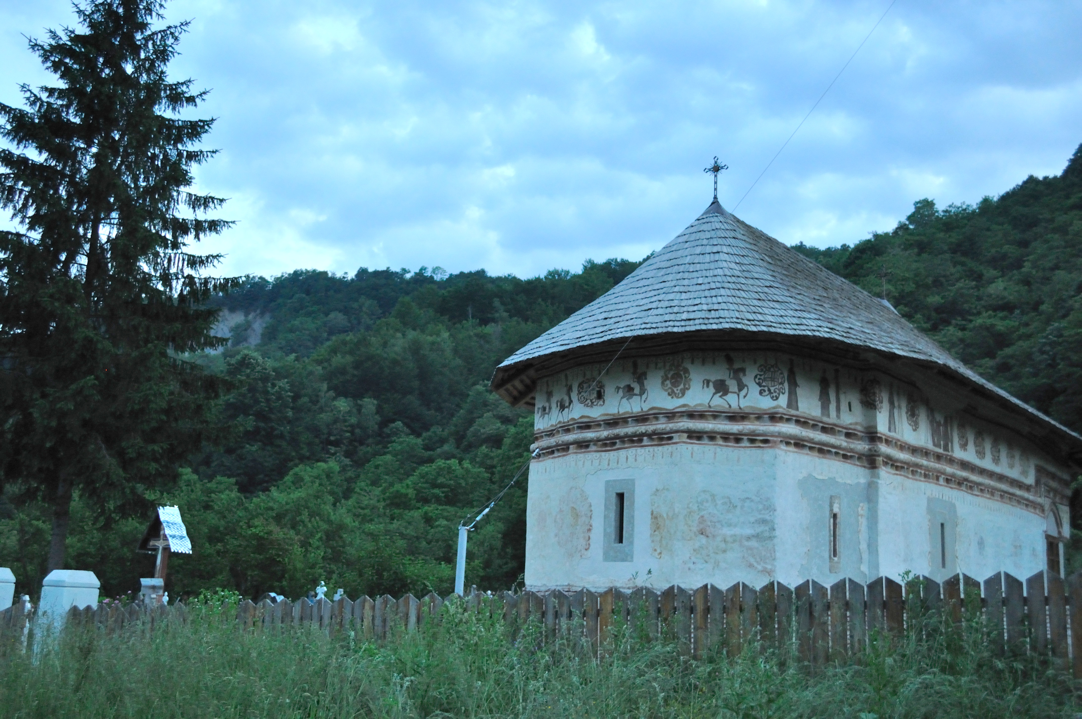 Biserica monument „Intrarea în Biserică”, sat Gorunești, Vâlcea